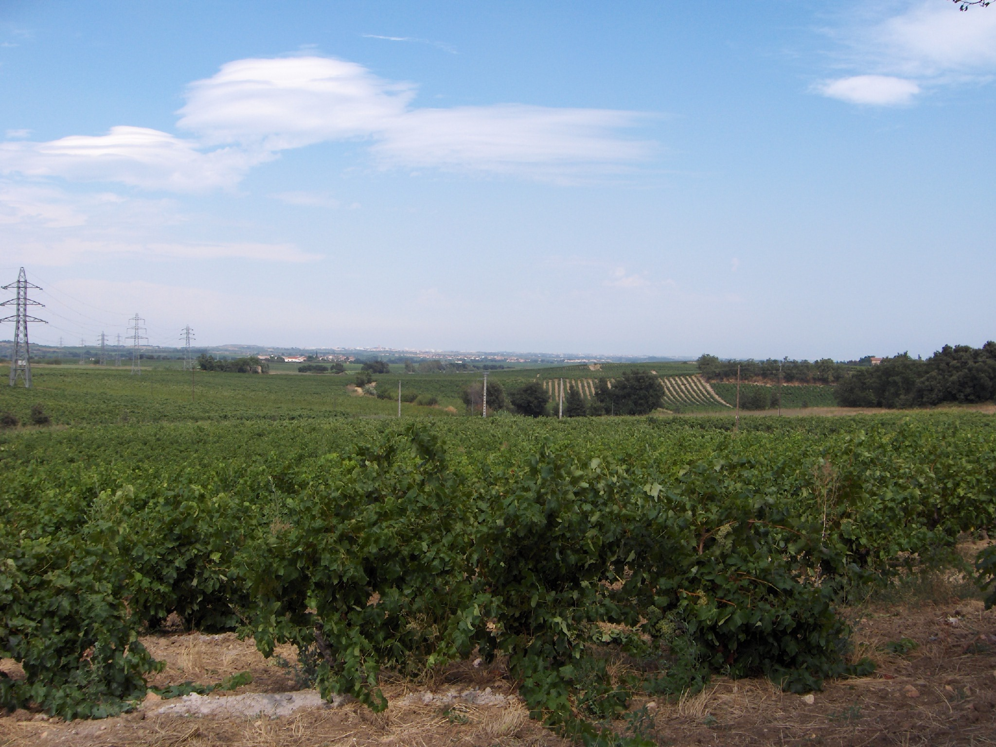 photo prise par mes soins, vignes de Trouillas sur la route de Villemolaque. Après les vignes on peut voir le Mas Deu et plus loin Perpignan